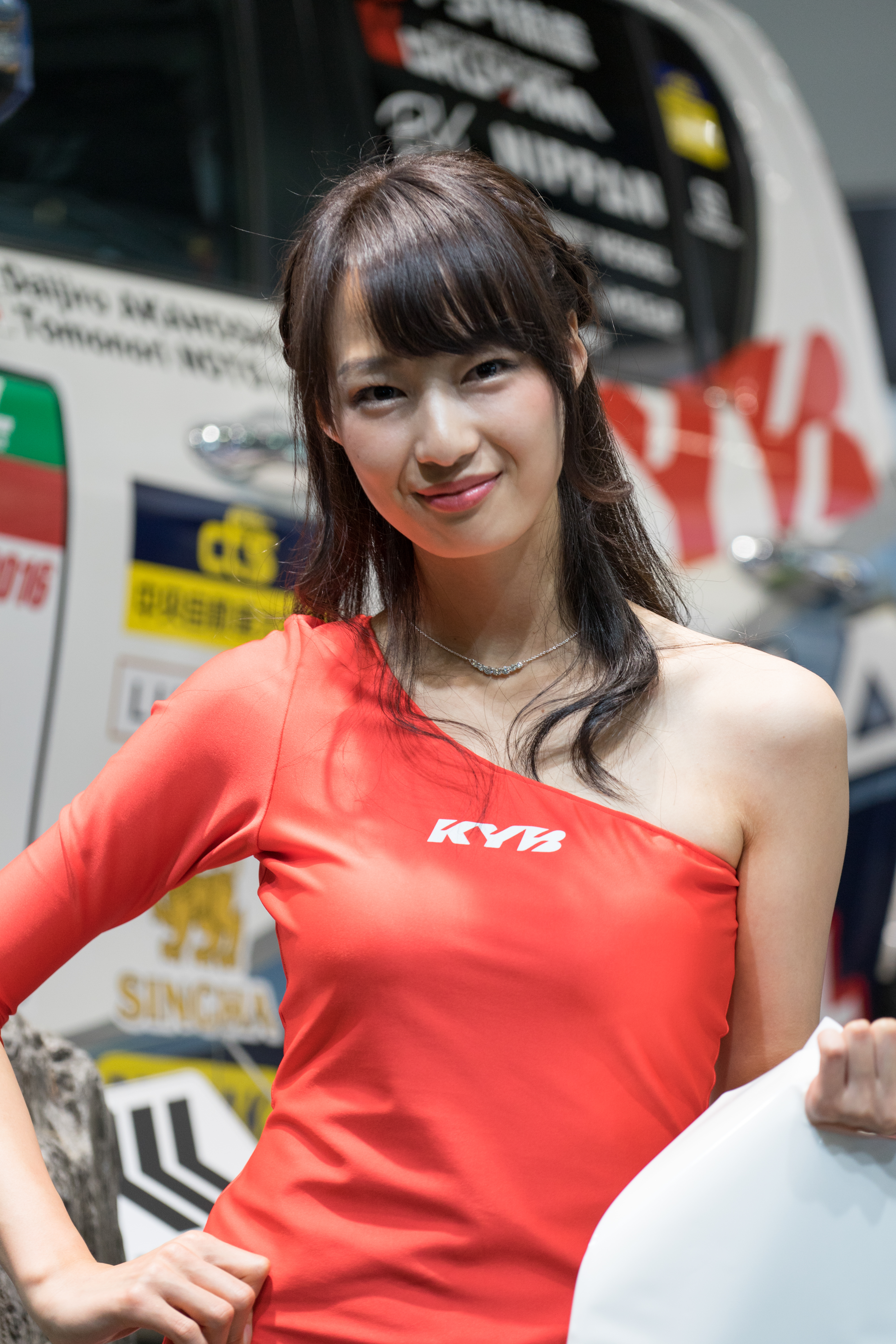 TOKYO AUTO SALON 2017 （東京オートサロン2017）-162.jpg